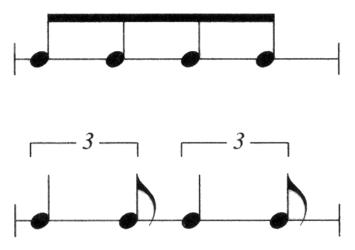 Triolenfeeling